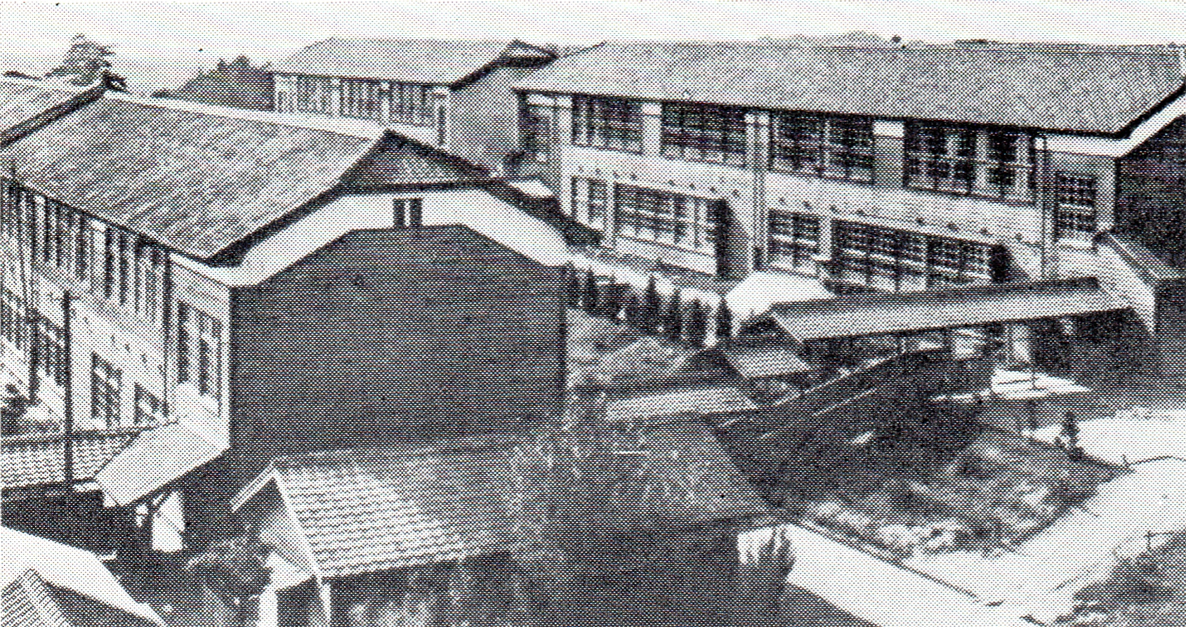 岡崎市立甲山中学校の旧校舎